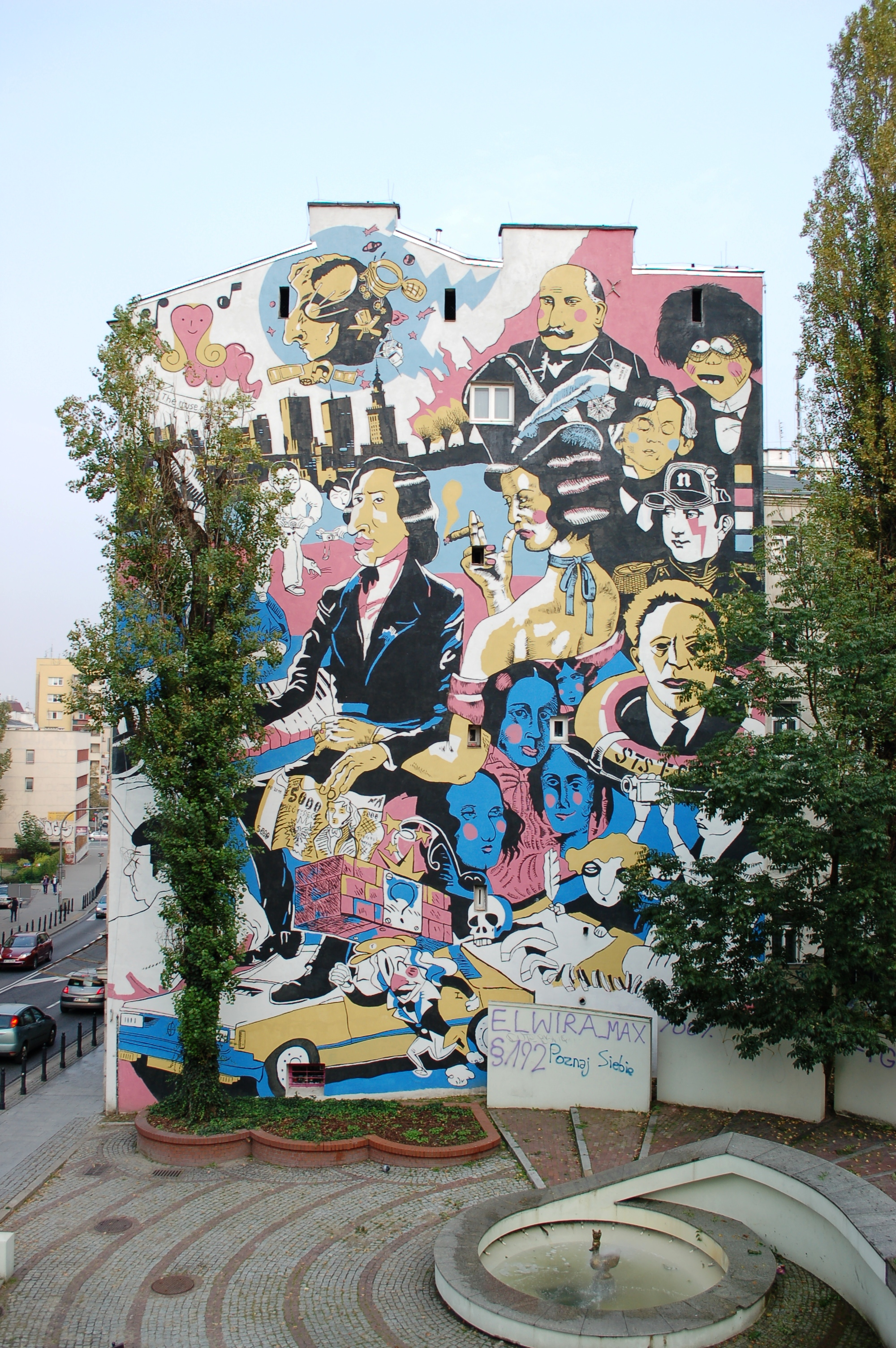 Warschau